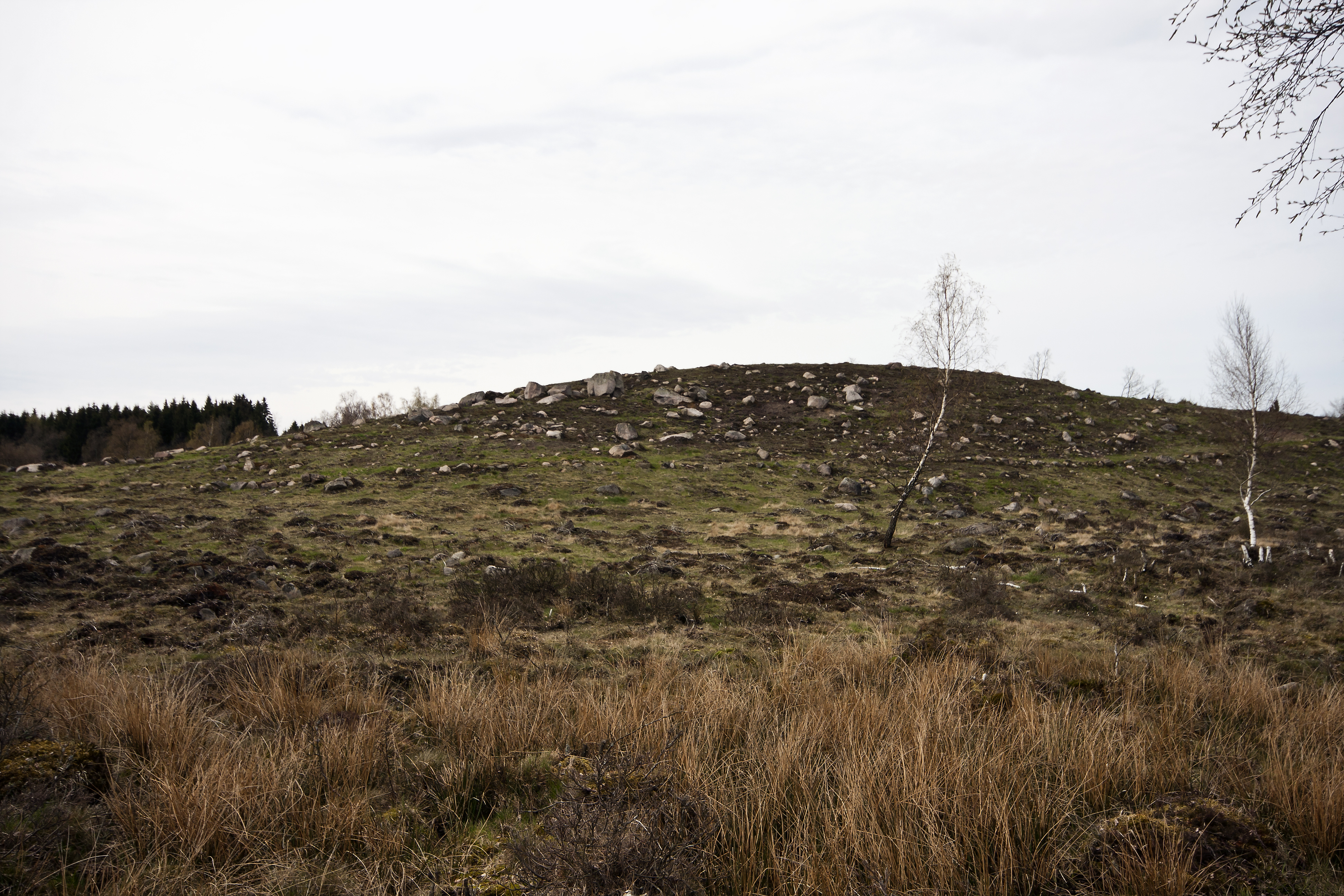 Boarps hed.